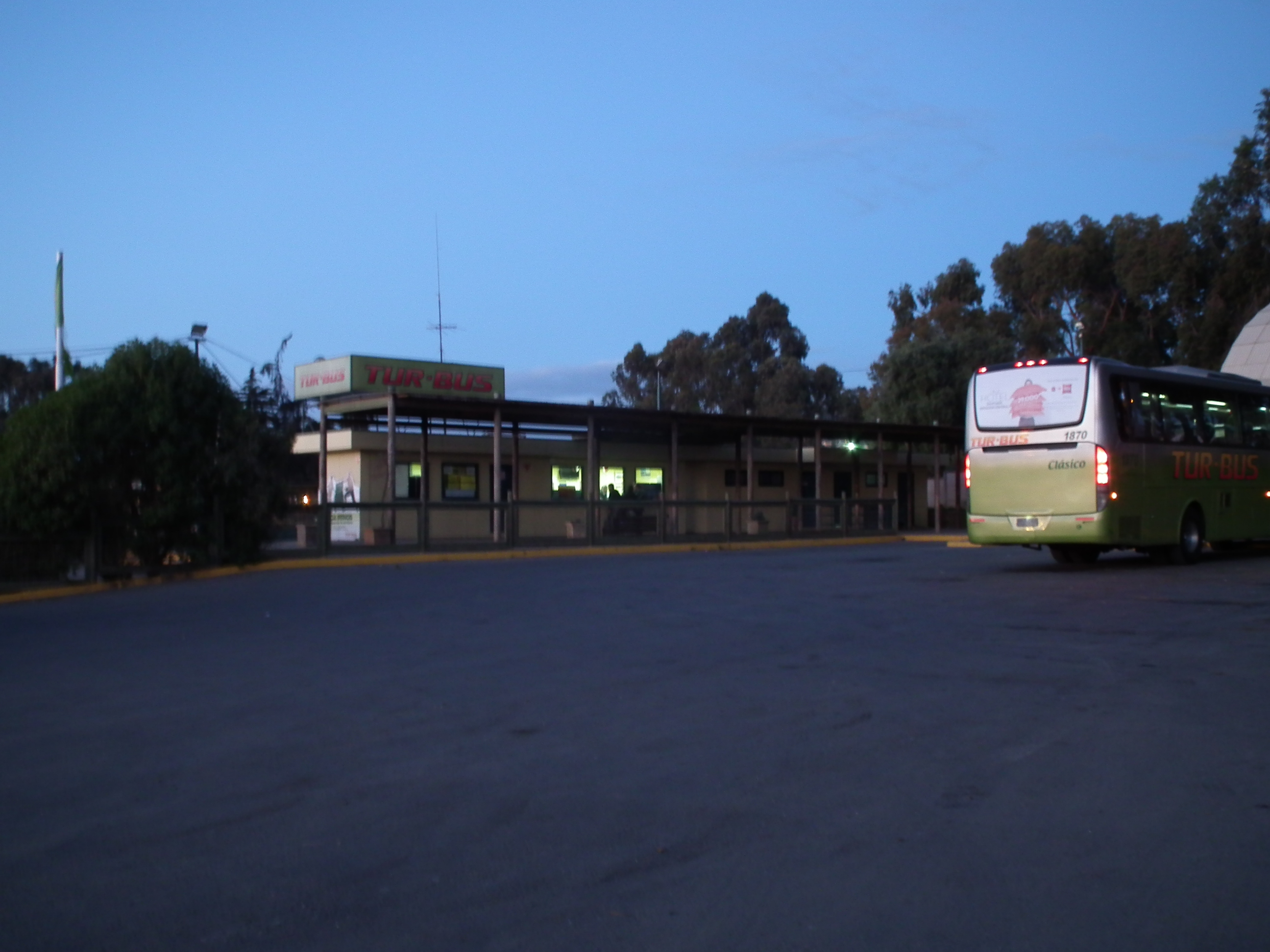 Terminal Rodoviario El Quisco localizado en el sur de la localidad